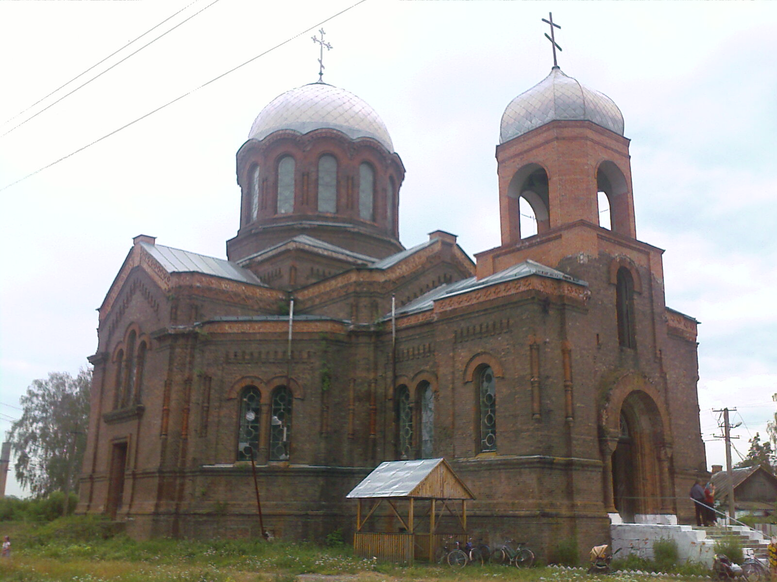 Церква Різдва Богородиці 1903 року в Низах